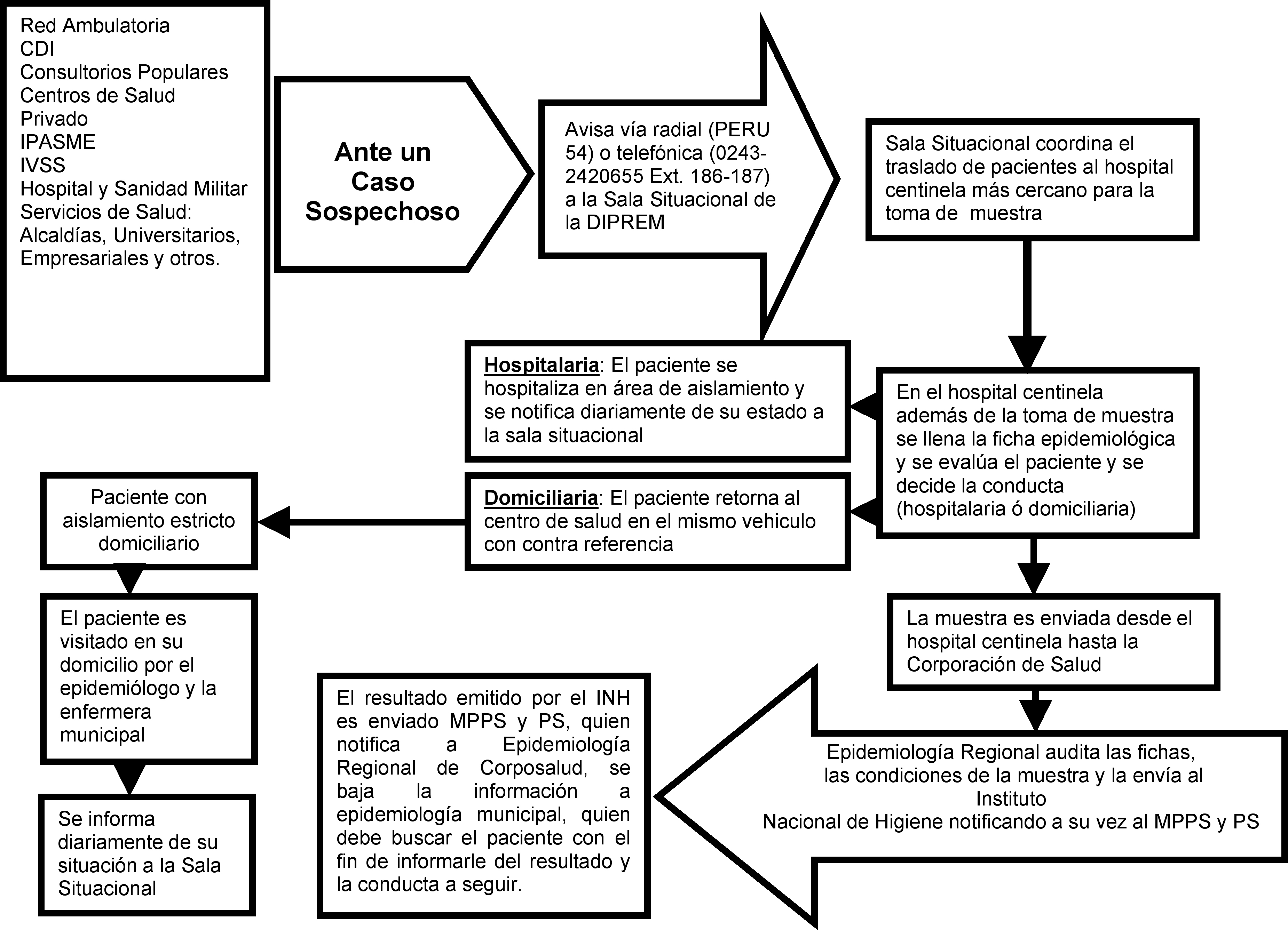 Diagrama de flujo del procesamiento de pacientes con H1N1 en el estado Aragua, reproducido por Corposalud.